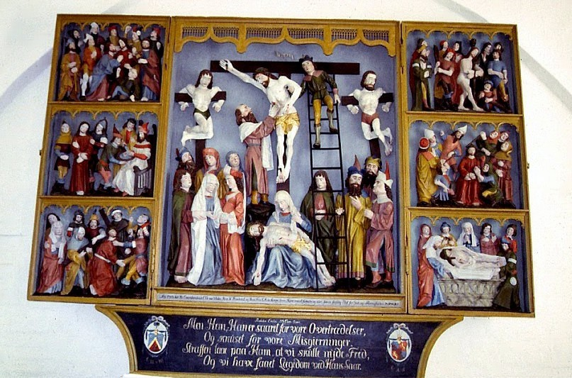 Brændekilde Kirke i Danmark. Altertavle